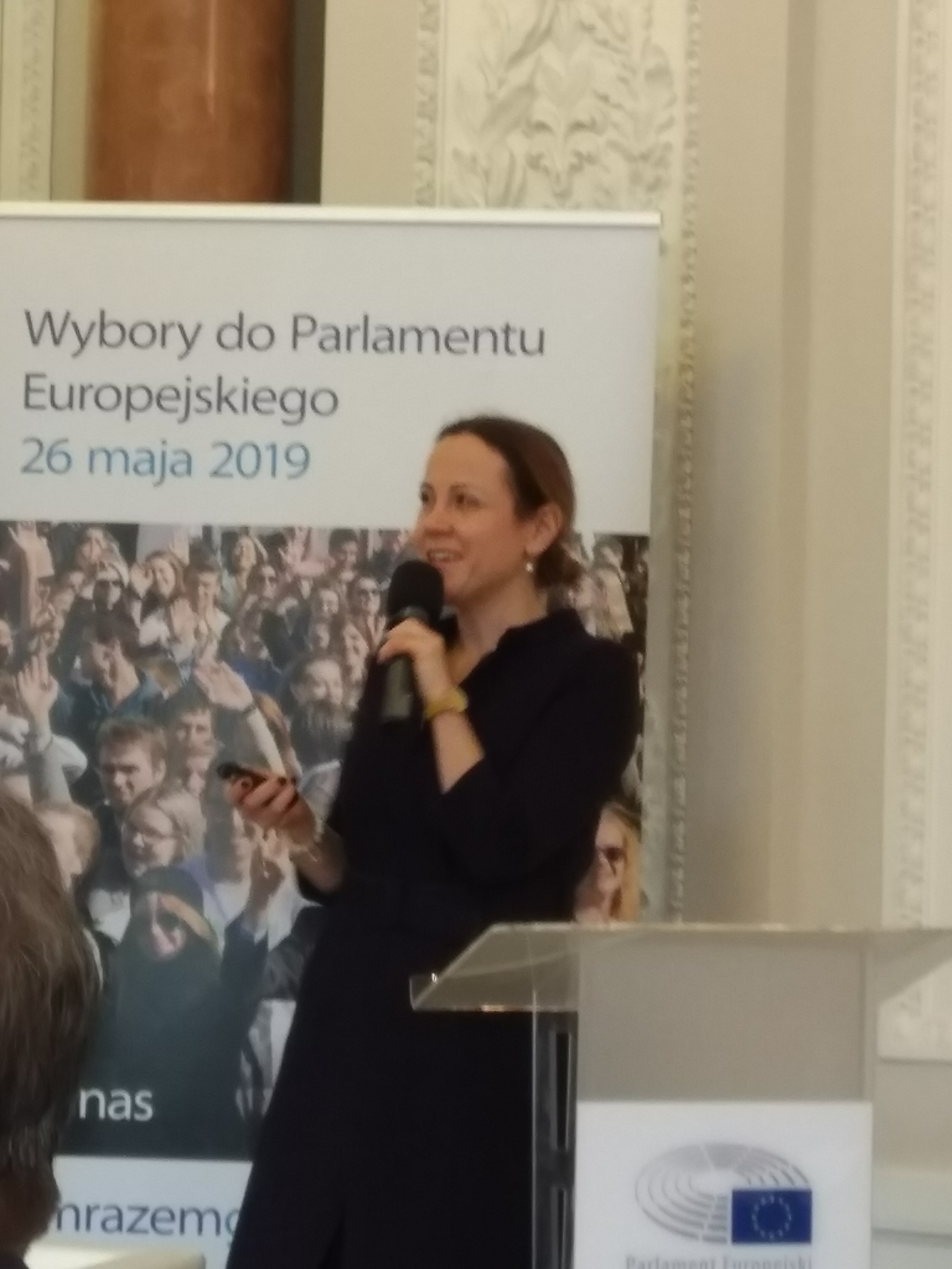 Prezentacja raportu ISP